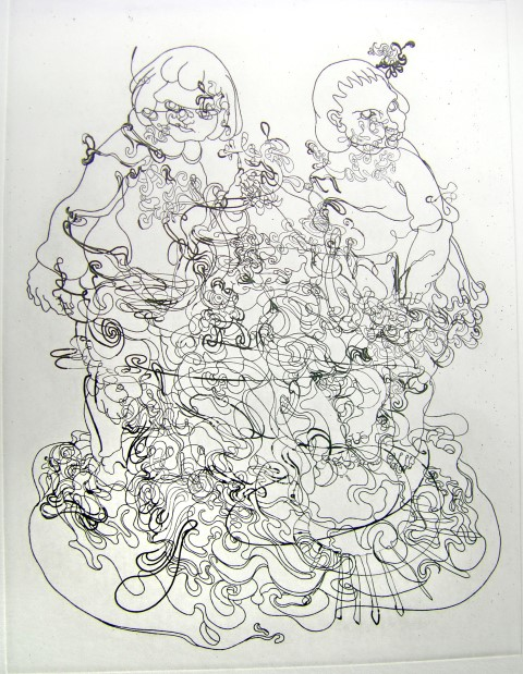 Thomas Ruch, Originaldruckgraphik, 2011